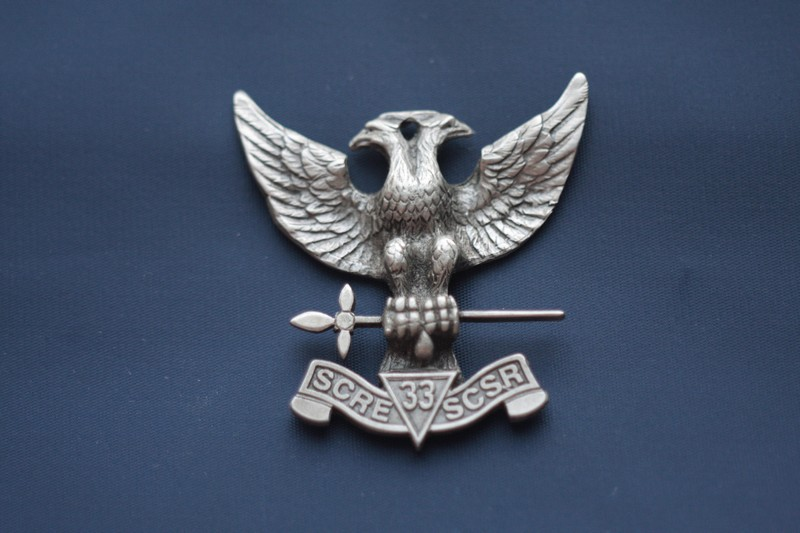 Bijou de 33ème du Souverain Collège du rite écossais pour la Belgique.